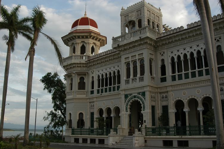 Cuba, september 2005, info in de Metadata